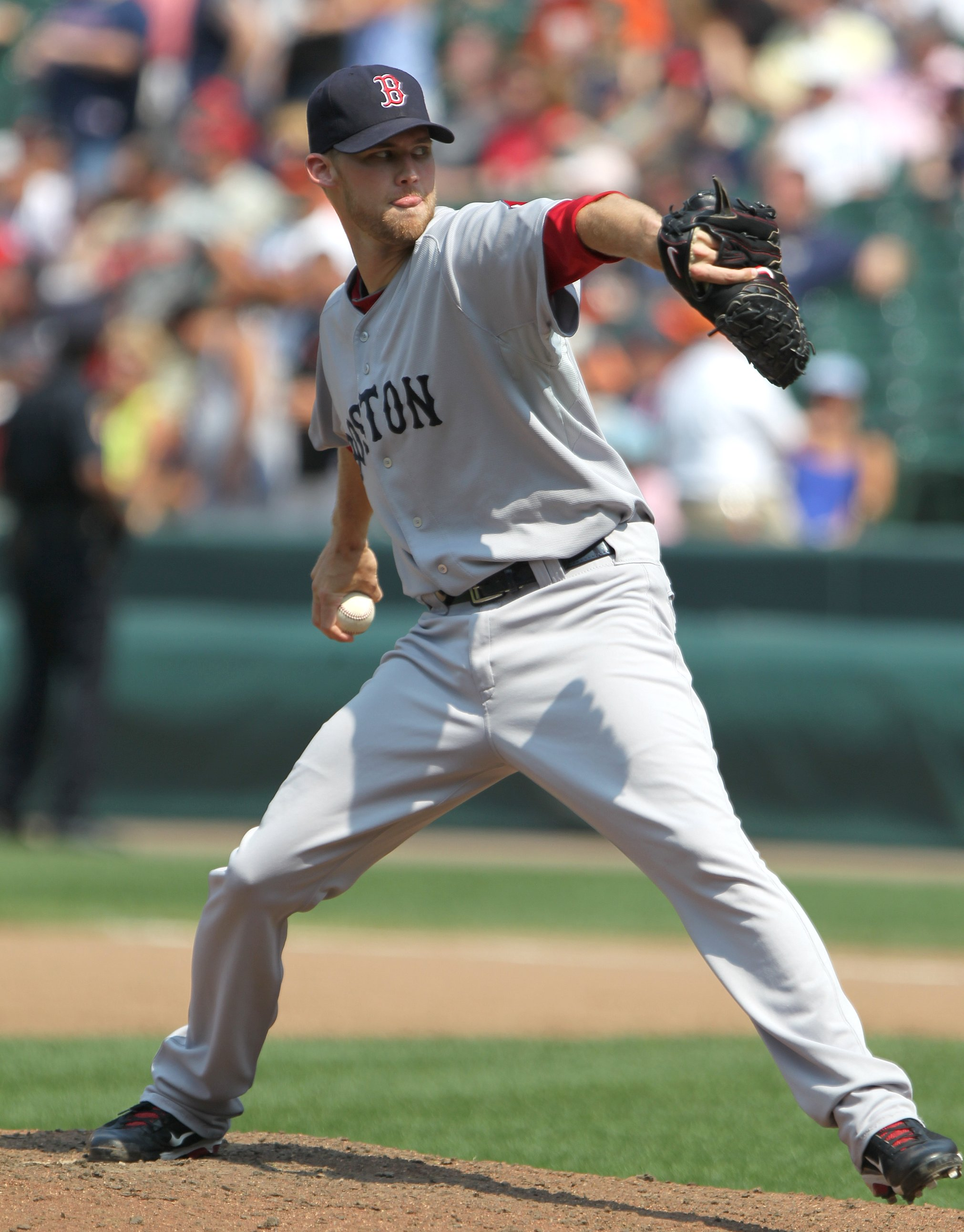 Daniel Bard